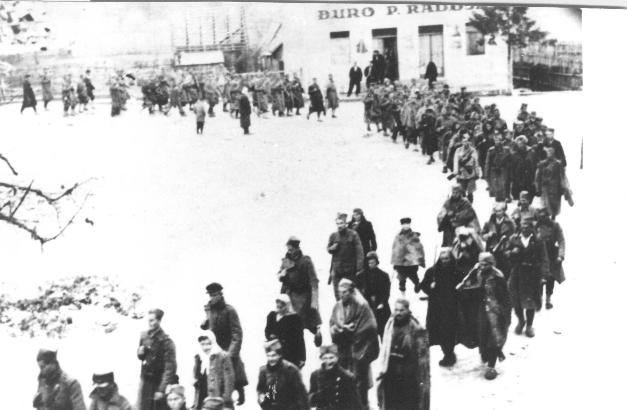 Srpskohrvatski / српскохрватски: Kolona partizana u Prozoru, zima 1942/43.